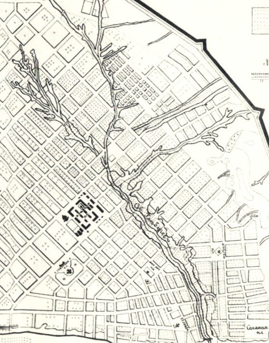 Map illustrating Glebuchev ravine in Saratov